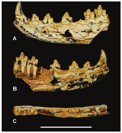 Thylacinus yorkellus, holotype SAM P29807, incomplete left dentary. Photographs of the specimen. (A) Lateral view (B) medial view (C) dorsal view. Scale bar = 50 mm. Photographs by Steven Jackson.